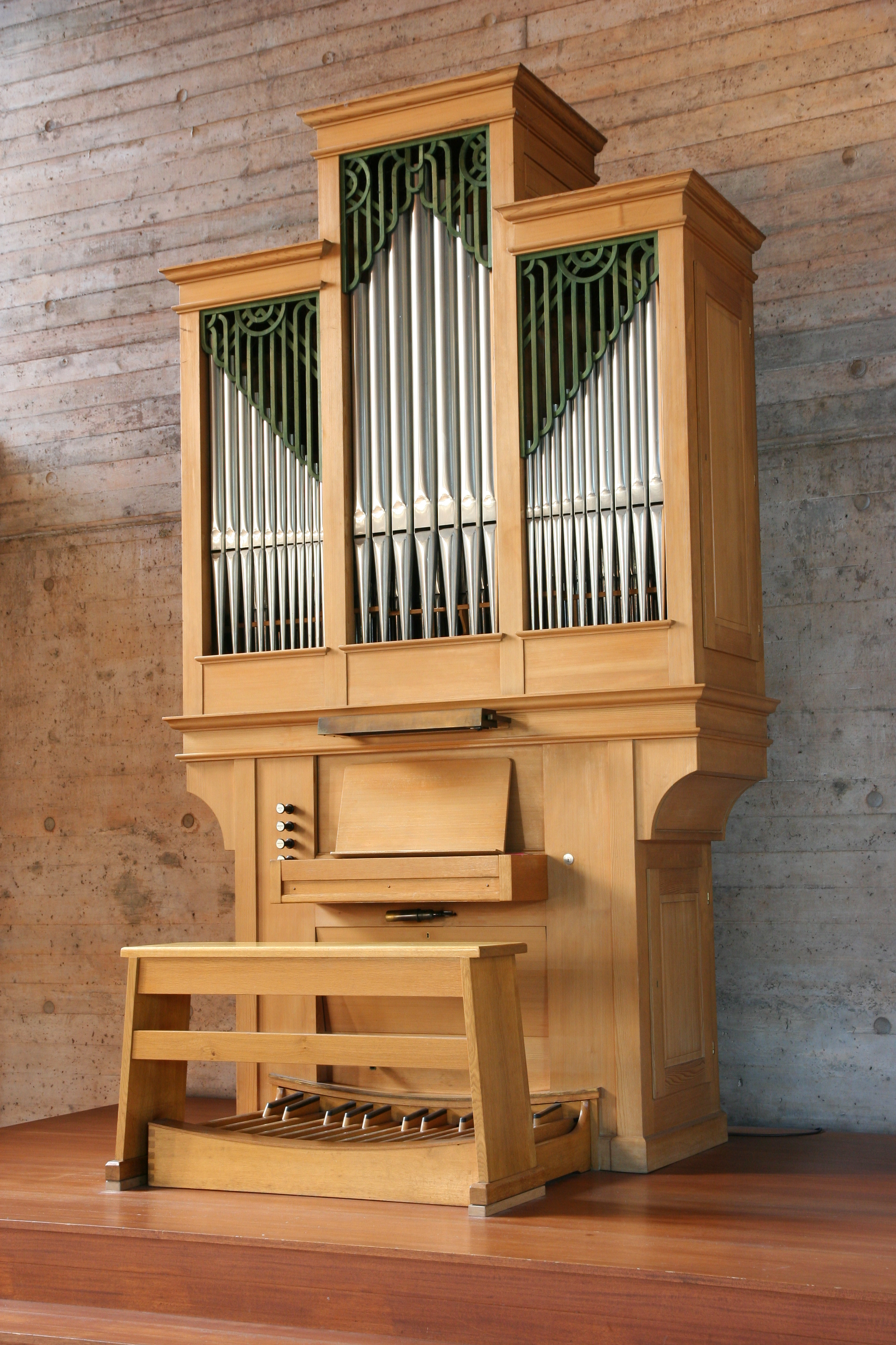 Römisch-katholische Pfarrkirche St. Martin Birmensdorf ZH